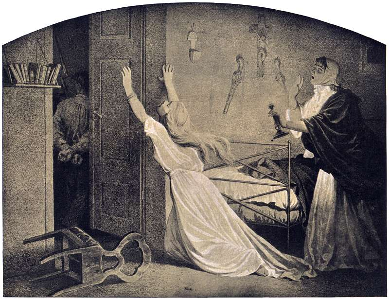 Cykl "Polonia", II. Branka by Artur Grottger